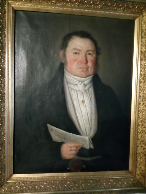 Joseph Heiserer, Ölgemälde 1840